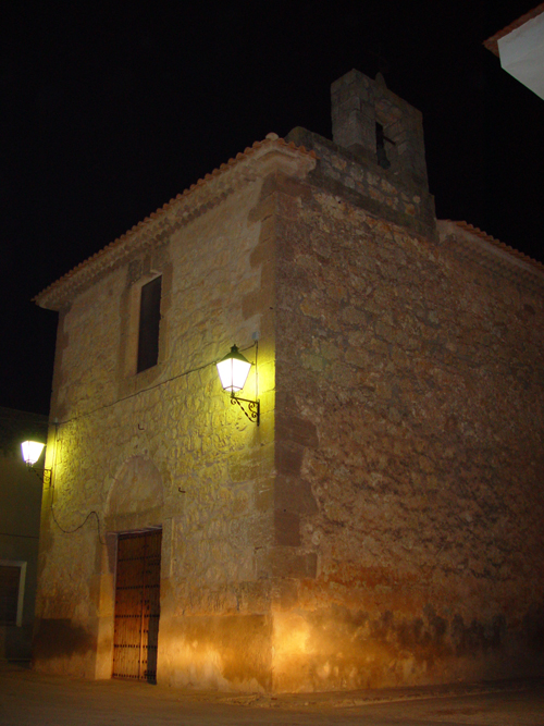 Ermita de San Julián en Casas de Haro.